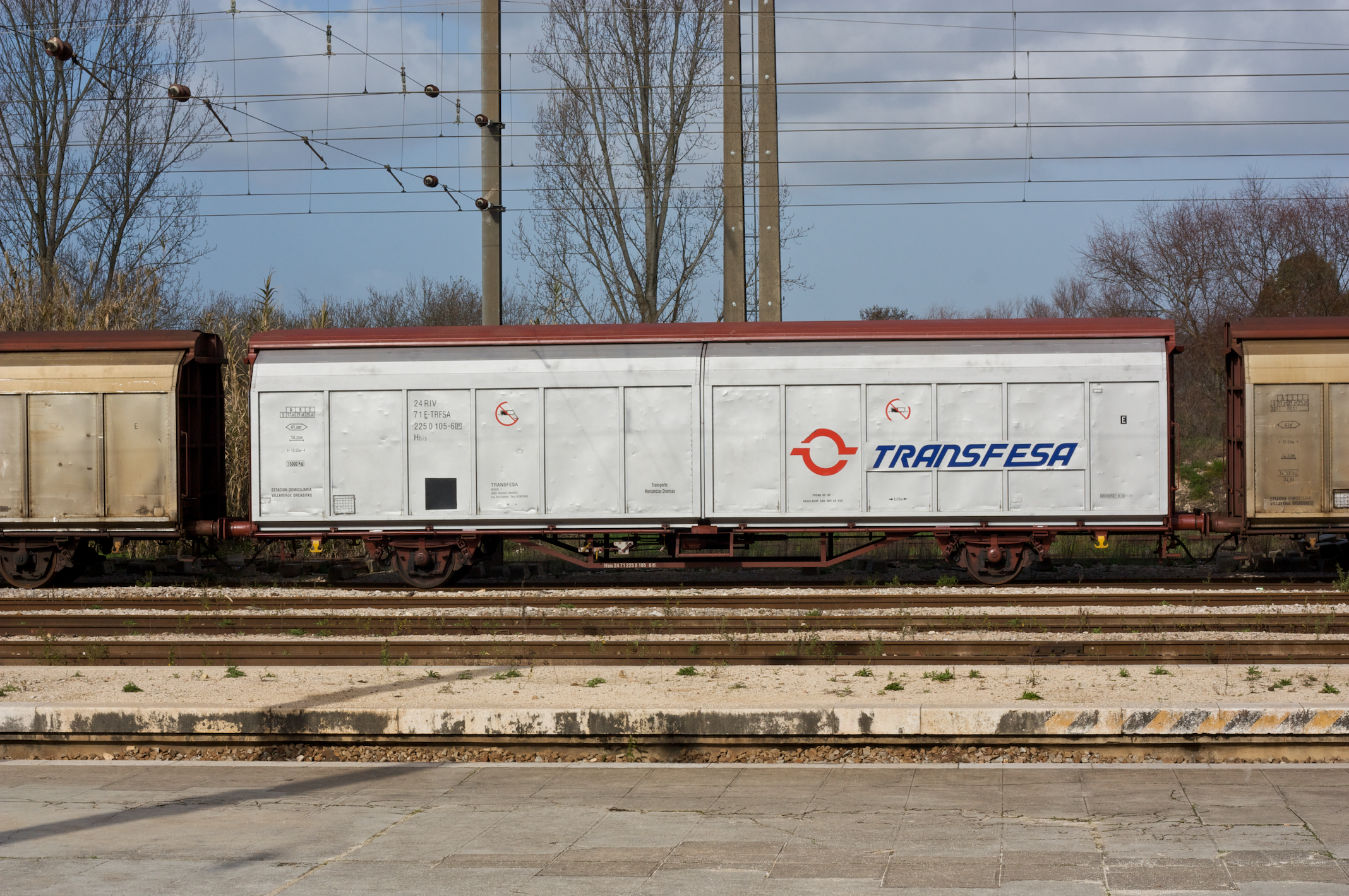 Tipo: Vagão coberto com porta de correr Local: Estação de Alfarelos [Linha do Norte, PK 198 • Ramal de Alfarelos, PK 221] Data e hora: 24 de Janeiro de 2008 [11h45] Material: Tranfesa Hbis Nº UIC: 24 71 225 0 105-6 P